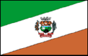 Flag of São José do Sul, Rio Grande do Sul, Brazil.